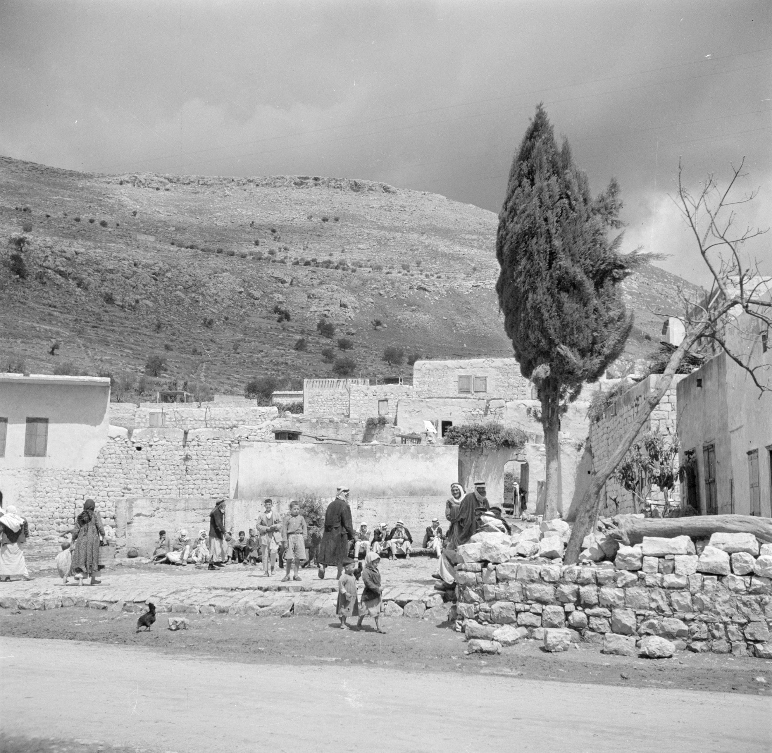 Het in Galilea gelegen dorp Mag-del-Krum, ook wel Majd al-Krum genoemd, is in 2003 opgegaan in de stad Shaghur (of: Shagor). Reportage / Serie: Israël 1948-1949: Mag-del-Krum.